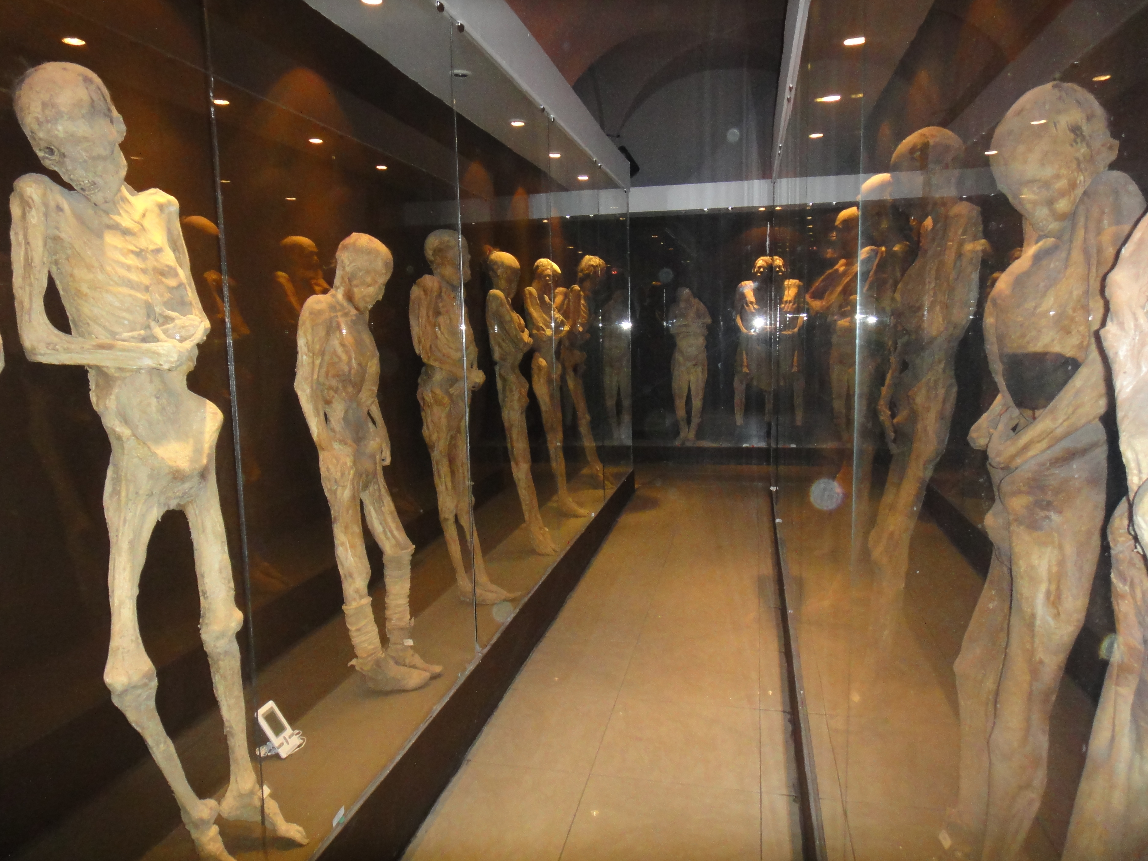 MOmias de Guanajuato, en un museo un poco retirado del centro de la ciudad